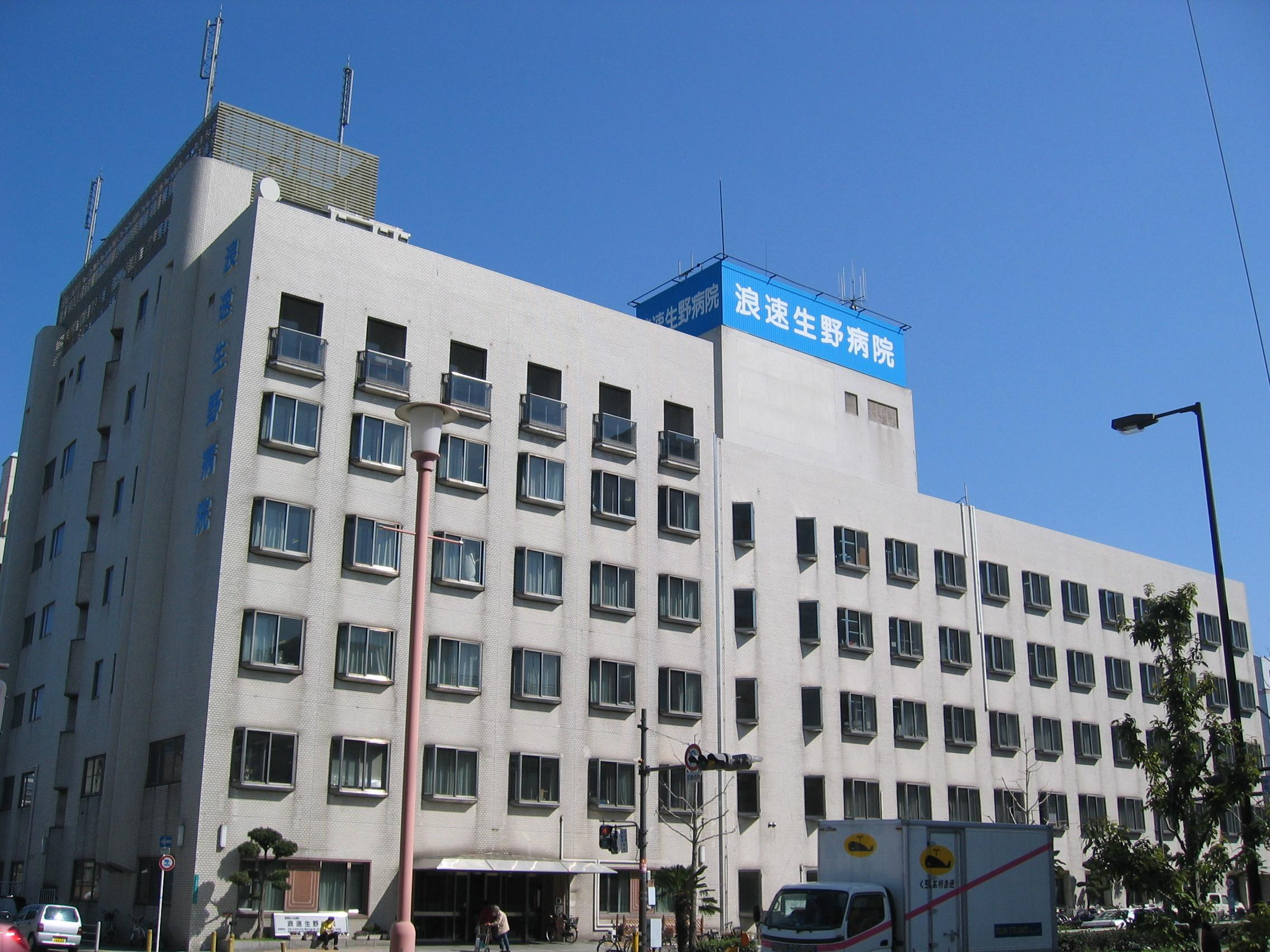 医療法人弘道会 浪速生野病院を撮影。